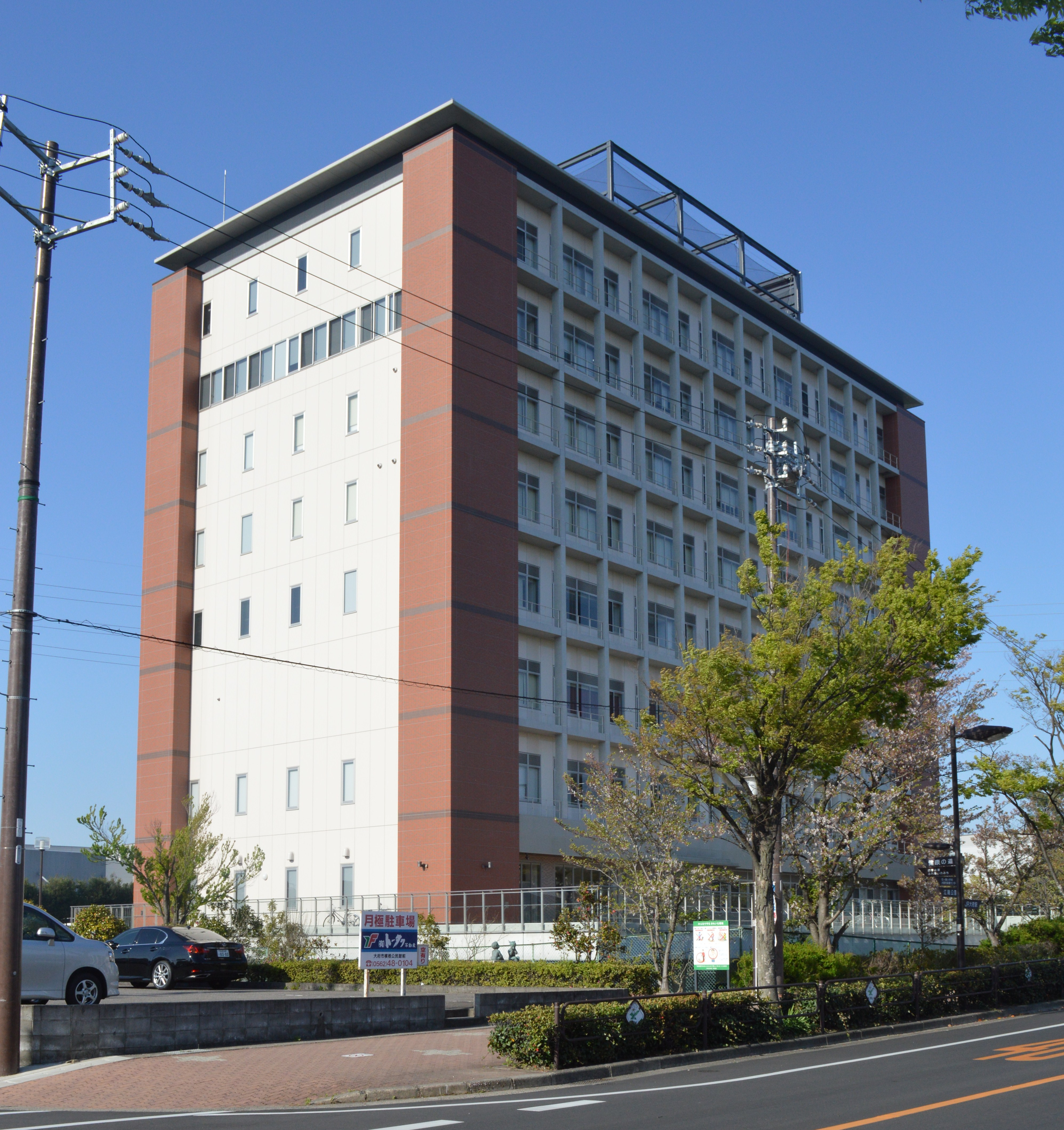 人間環境大学大府キャンパス（看護学部）、愛知県大府市